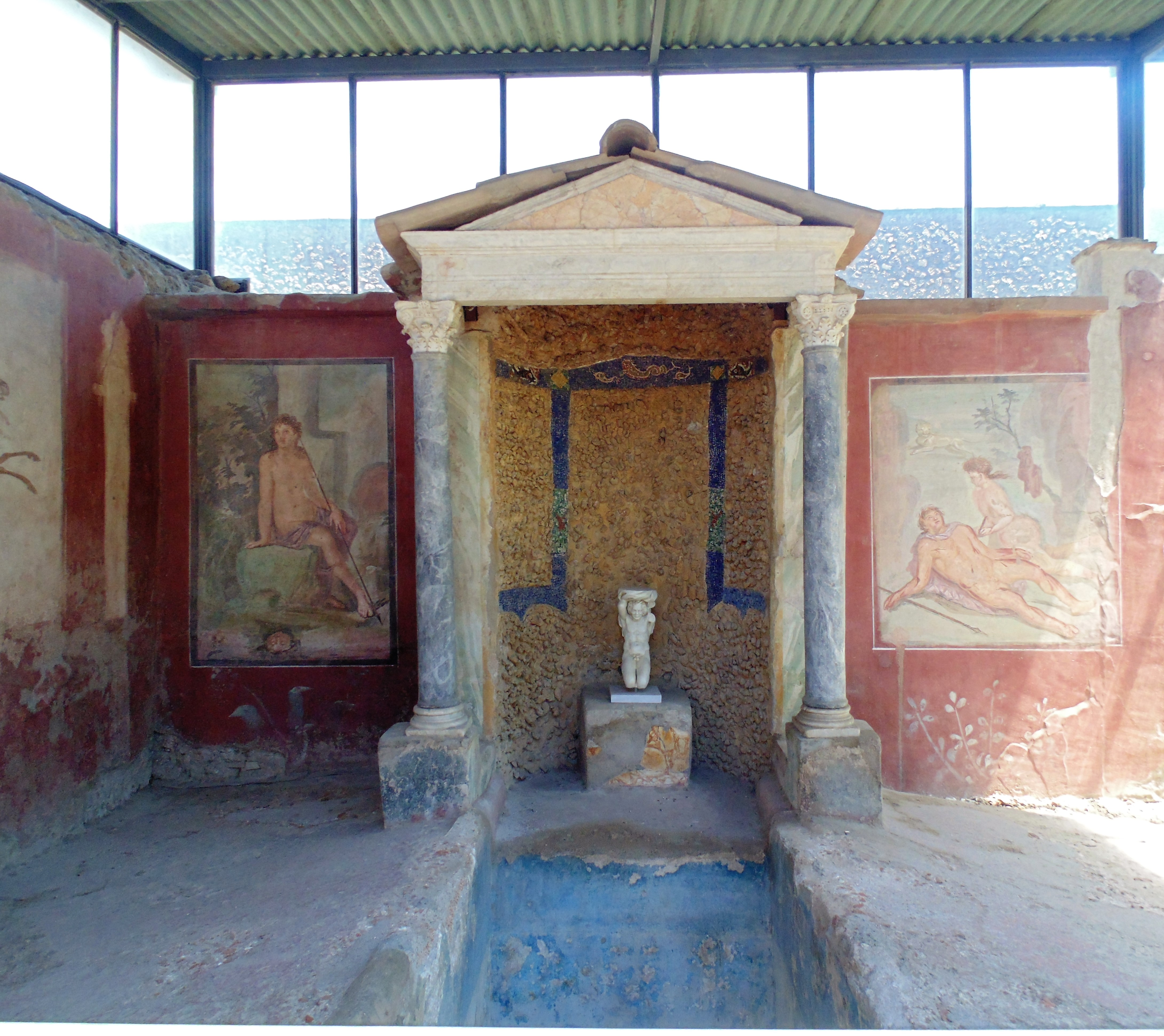 Casa di Ottavio Quartione This is a photo of a monument which is part of cultural heritage of Italy.